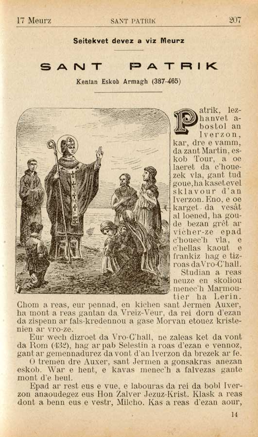 Perrot. Bue ar Zent. tr. 207